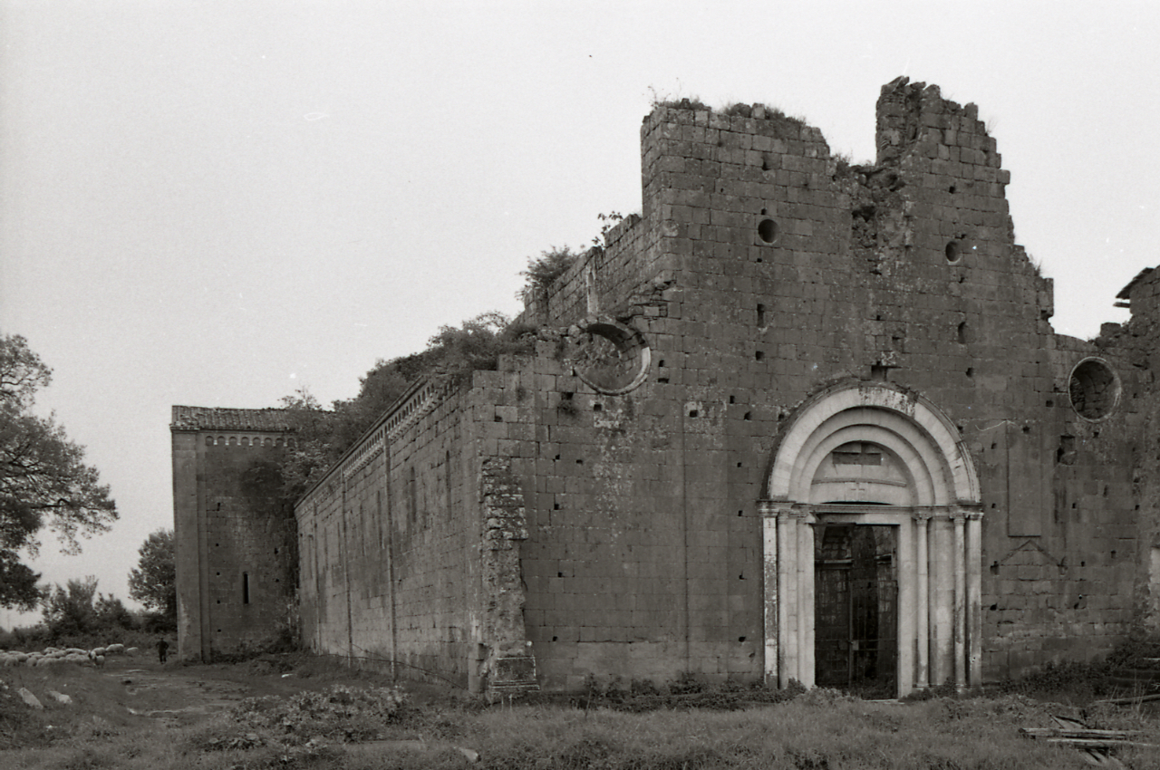 Servizio fotografico : Civita Castellana, 1972 / Paolo Monti. - Strisce: 4, Fotogrammi complessivi: 22 : Negativo b/n, gelatina bromuro d'argento/ pellicola ; 35 mm. - ((Sul portanegativi: NIKMAT FP4. - (2):. - 16-22 = architetture;. - 23-37 = paesaggi. - Occasione: Campagna di rilevamento del Viterbese e Documentazione per la pubblicazione: Raspi Serra Joselita, "La Tuscia romana un territorio come esperienza d'arte: evoluzione urbanistico-architettonico", Milano, Electa, 1972 (su ordine della Dott.ssa). - Fonte: Agenda di Paolo Monti: Leica 1501-3000 Controllo numerazione (1950-1978), presso Archivio Paolo Monti. - Fonte: Monografia di Raspi Serra, Joselita: La Tuscia romana un territorio come esperienza d'arte: evoluzione urbanistico-architettonico, Milano, Electa (1972). - Fonte: Fattura di Paolo Monti: IV. Commesse/ Fattura/ Soprintendenza Gallerie di Roma (1972/12/12), presso Archivio Paolo Monti. N. 136 riprese. N.B. fattura manoscritta. - Fonte: Agenda di Paolo Monti: Monti - Agenda 1972 (1972)